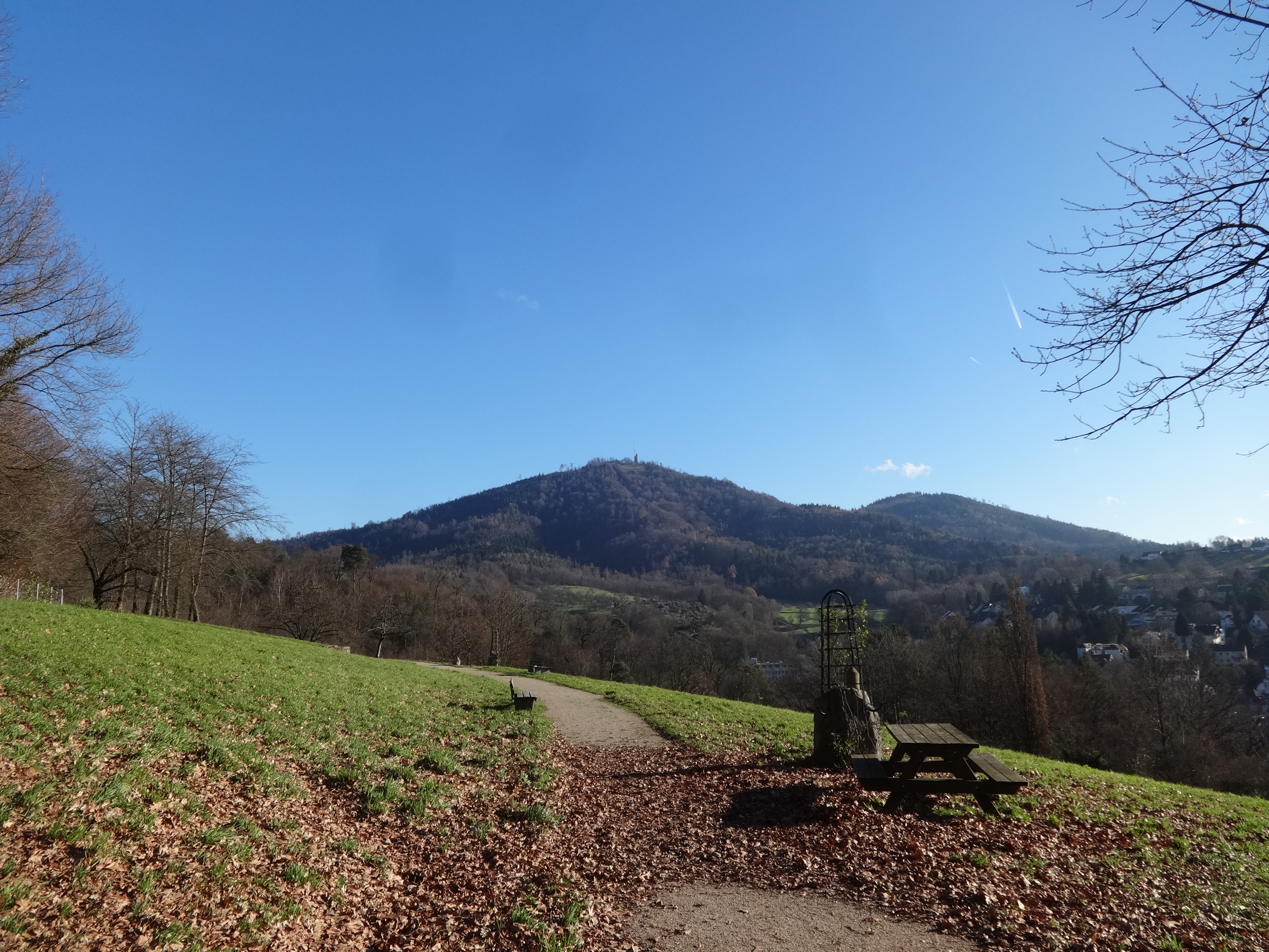 Der Panoramaweg Baden-Baden ist ein rund 40 Kilometer langer Wanderweg, der um die Stadt Baden-Baden führt. Er wurde 1997 neugestaltet und 2004 vom Deutschen Tourismusverband als „schönster Wanderweg“ ausgezeichnet.